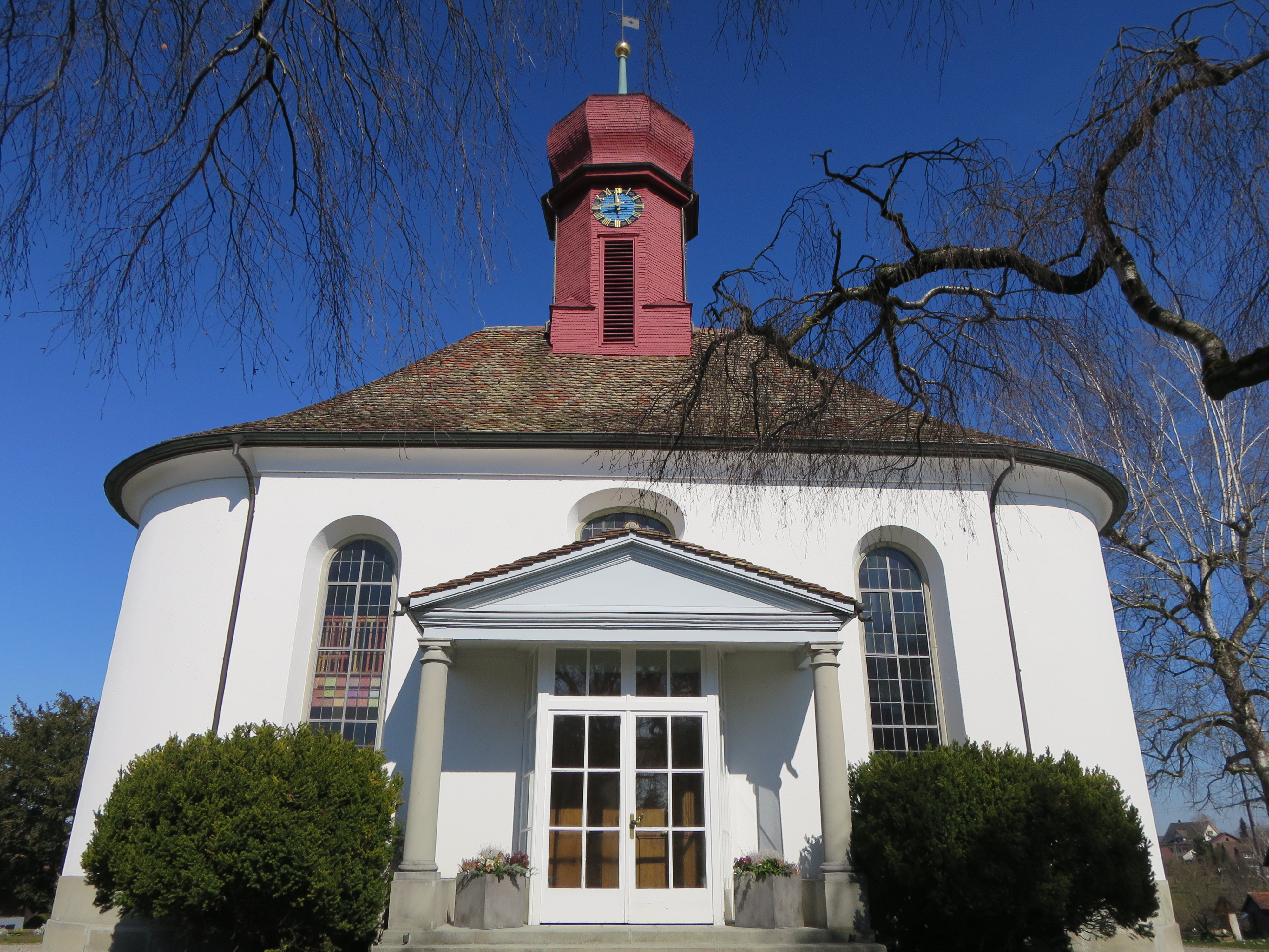 1812-1813 von Hans Conrad Bluntschi erbaut